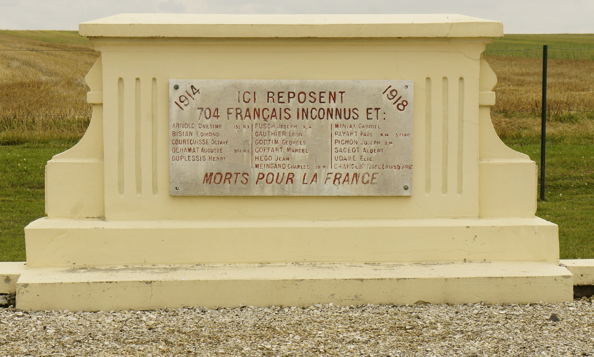 vue de l'ossuaire Sommepy-Tahure où se trouvent 721 corps de soldats français.